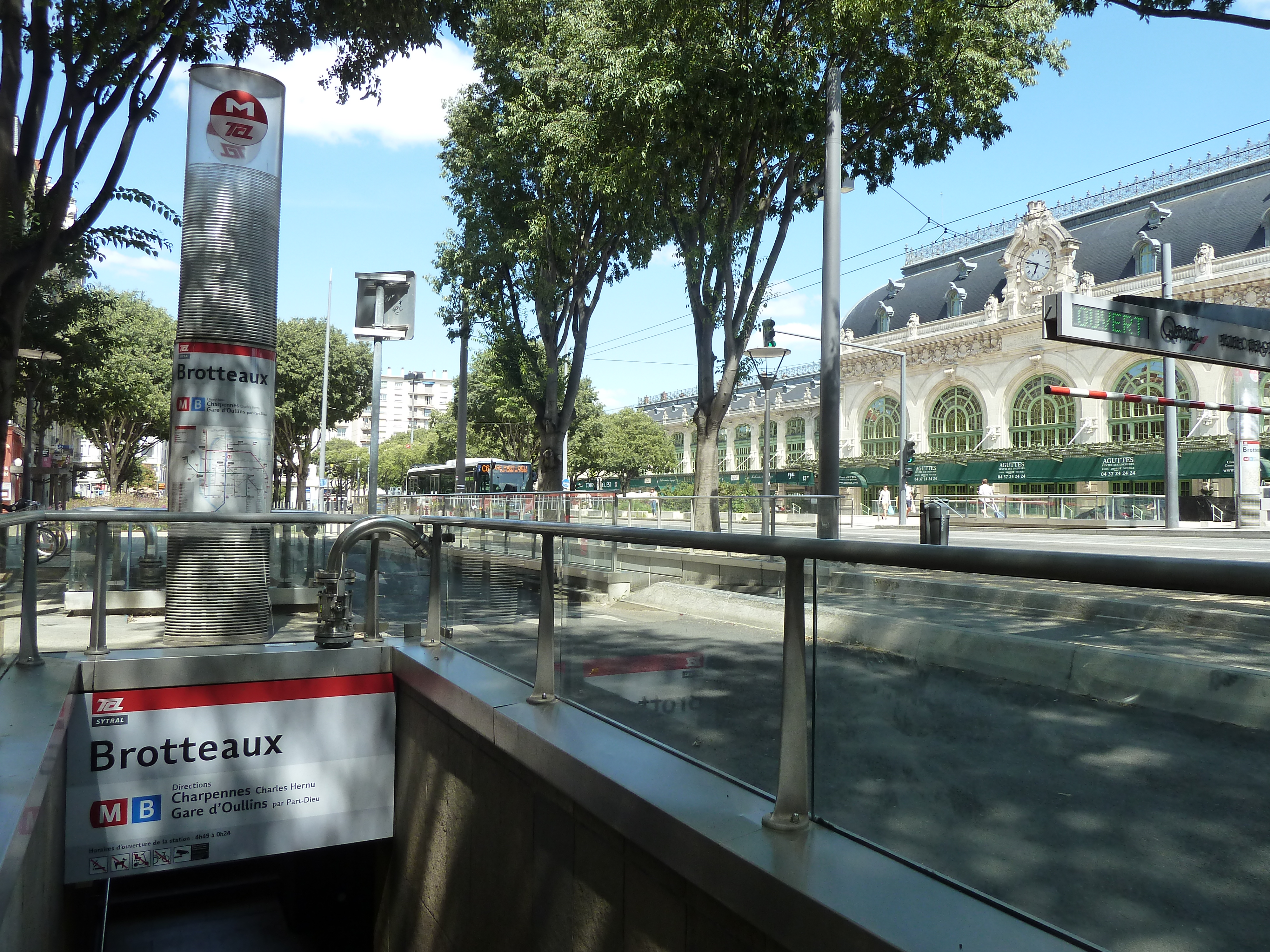 Entrée du métro Brotteaux sur le réseau TCL à Lyon.